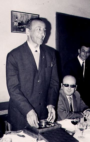 Alfredo d'Albertas, patron del Calcio Gozzano